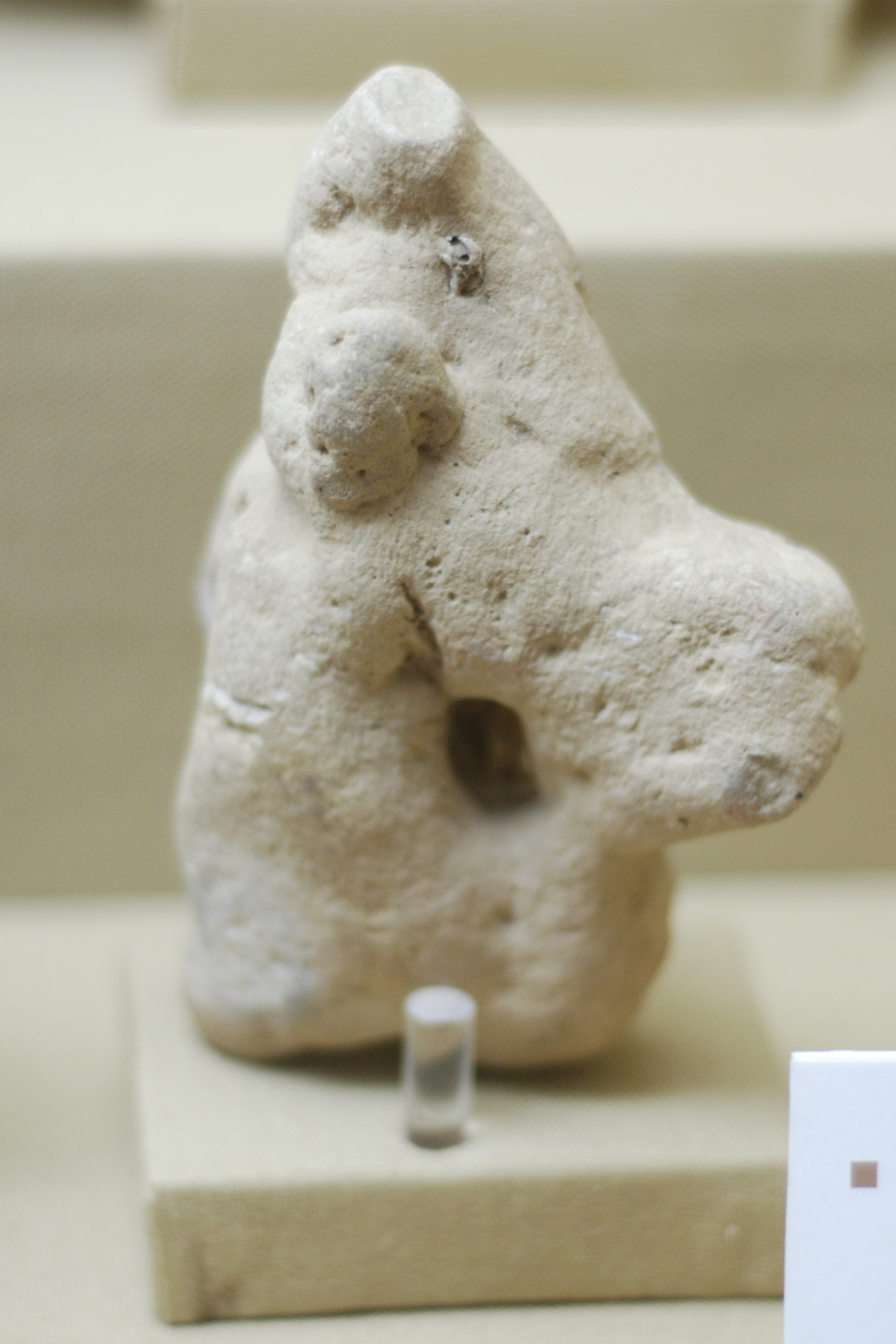 Muñedo de Loess, Estructura sedimentaria. Depósito calcáreo en sedimentos finos, de formas caprichosas, Weinheim, Baden, Alemania.